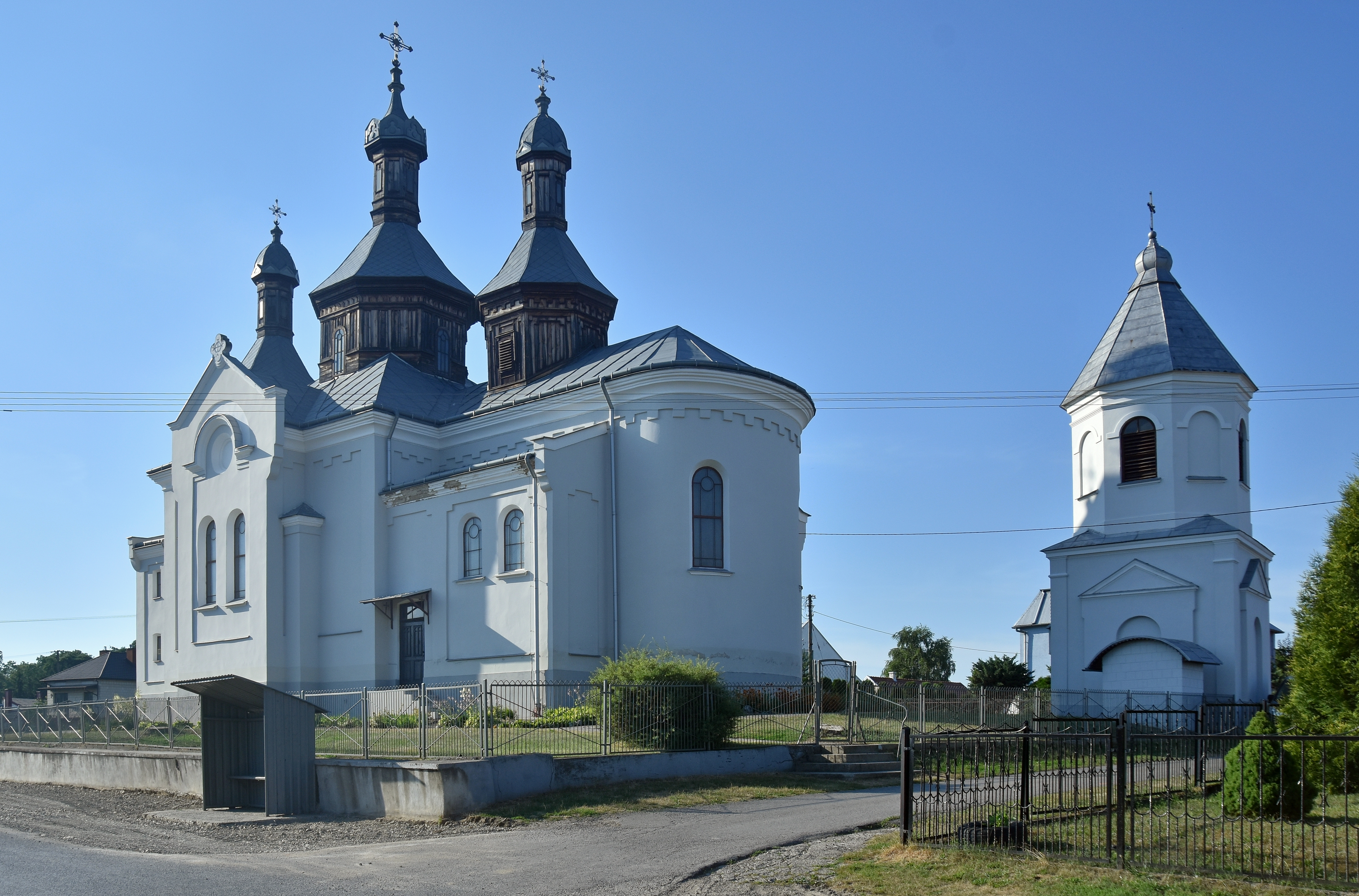 Wysocko, Cerkiew greko-kat. Narodzenia Przenajśw. Bogarodzicy, ob. kościół rzym.-kat. …